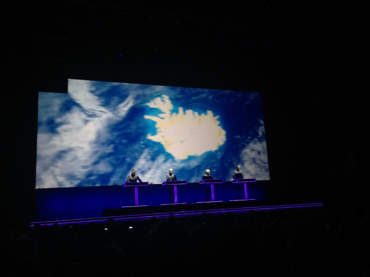 Kraftwerk spilar í Hörpunni á Airwaves 2013